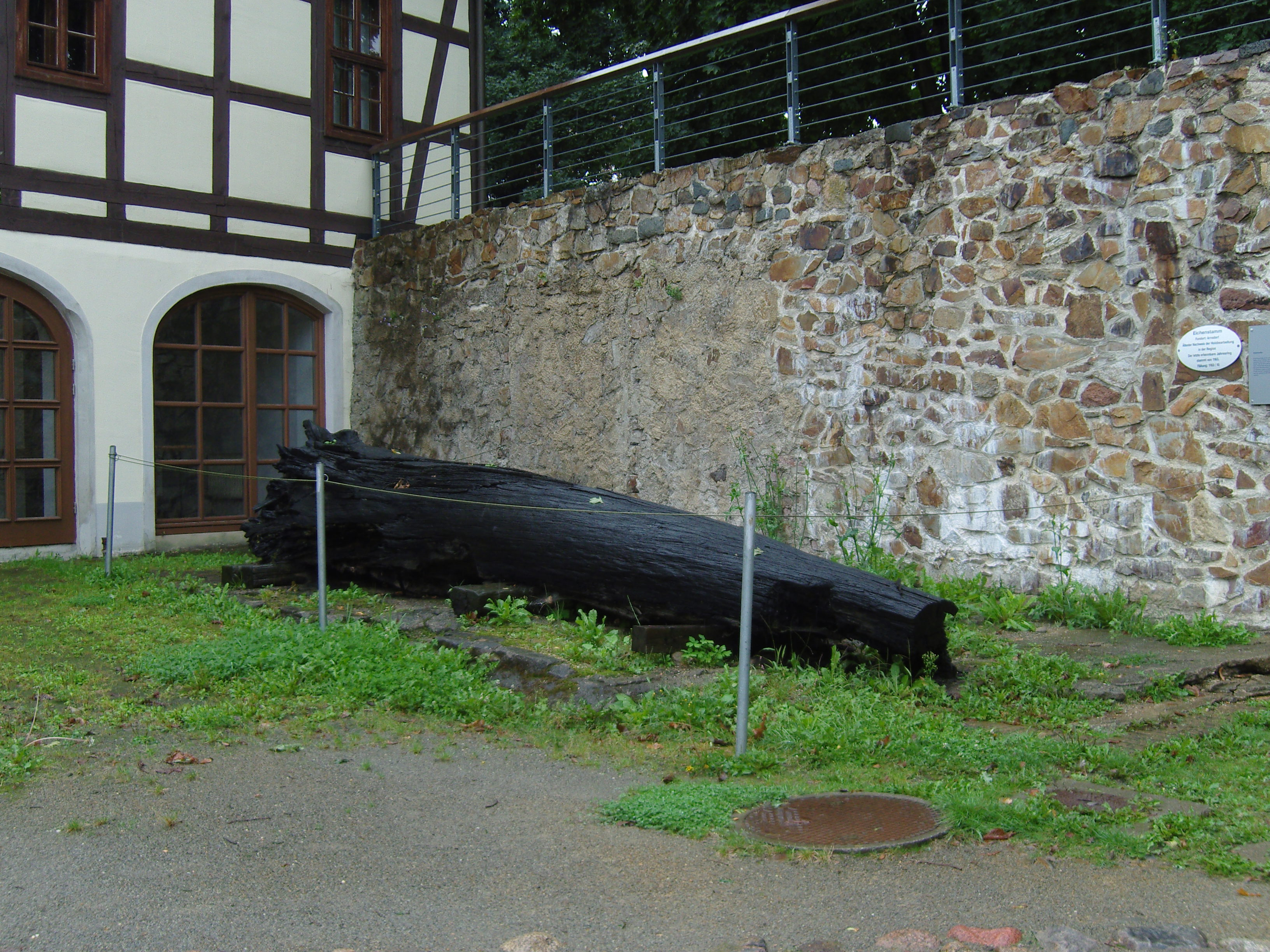 Baumstamm im Innenhof des Senftenberger Museums